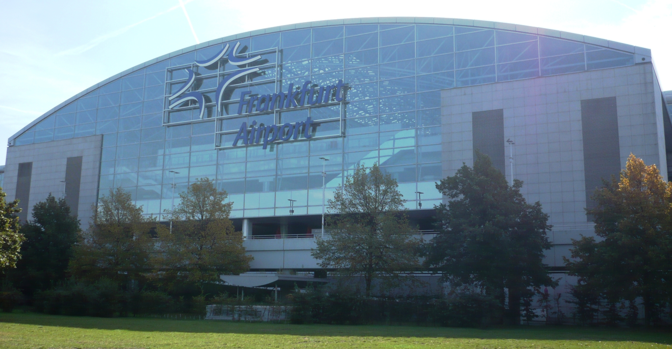 Terminal 2 des Frankfurter Flughafen